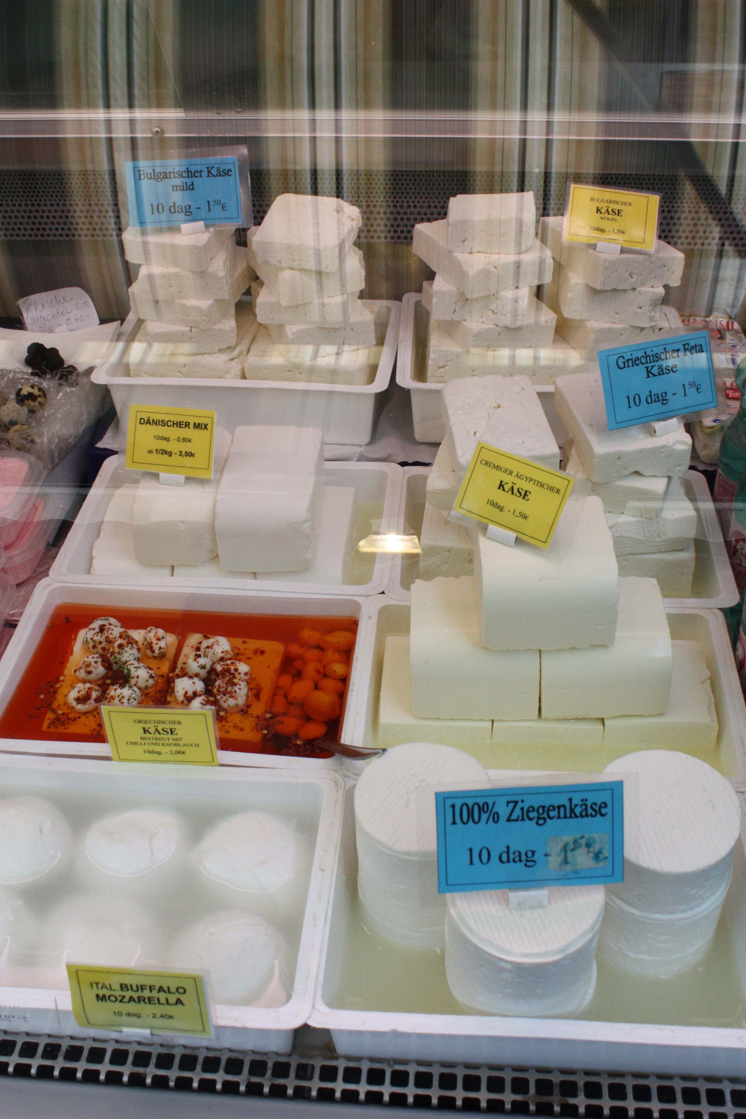 Naschmarkt, Vienna, Wien; Ziegenkäse, Dänischer Mix, Buffalo Mozarella, bulgarische Käse, griechischer Fetakäse